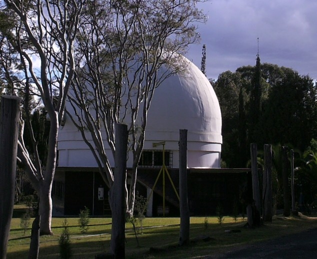 Telescopio de un metro de diámetro en el Observatorio Astronómico Nacional de Tonantzintla, Puebla, México, perteneciente al Instituto de Astronomía de la Universidad Nacional Autónoma de México.